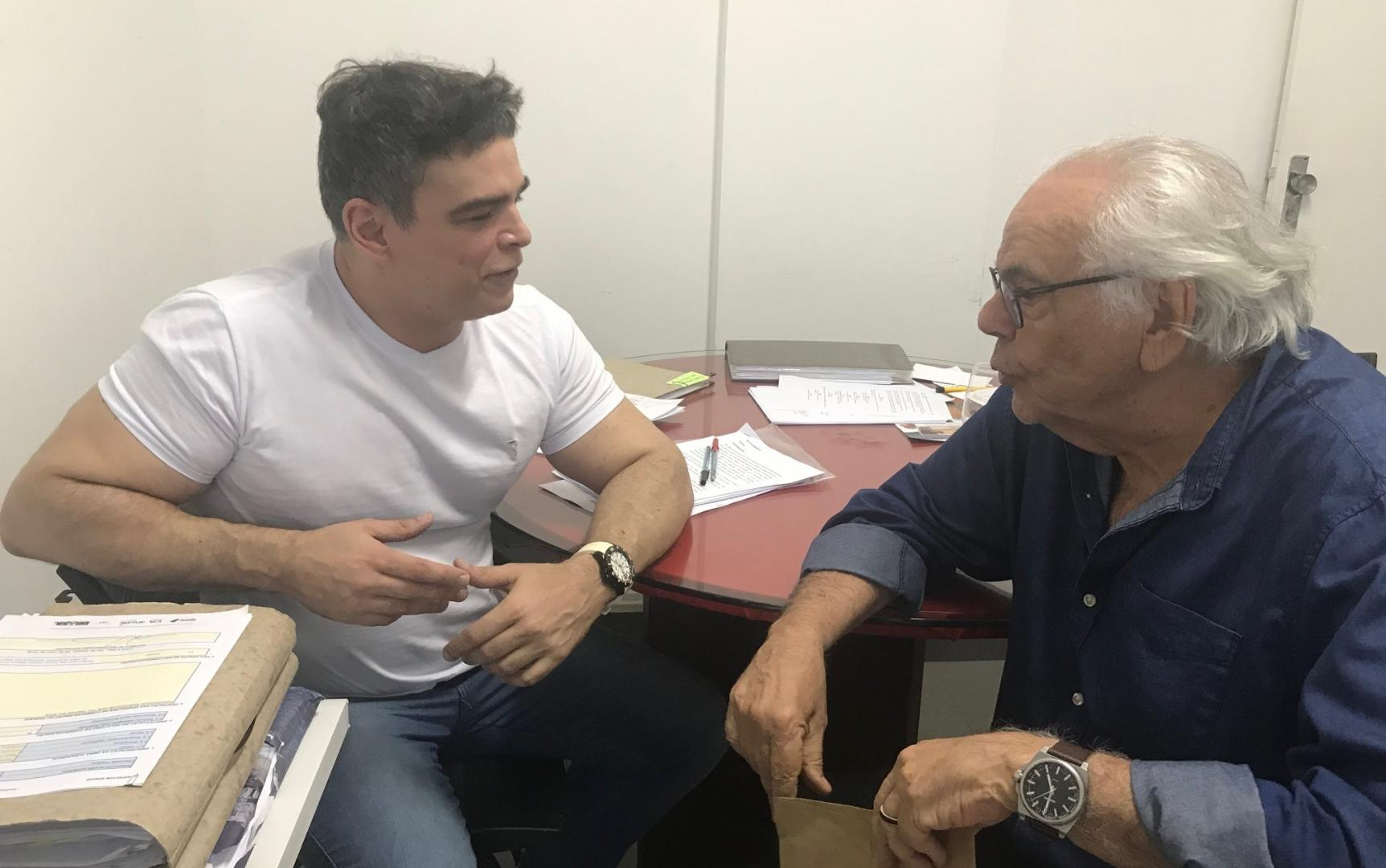 Zelito Viana e Marcelo Moraes Caetano